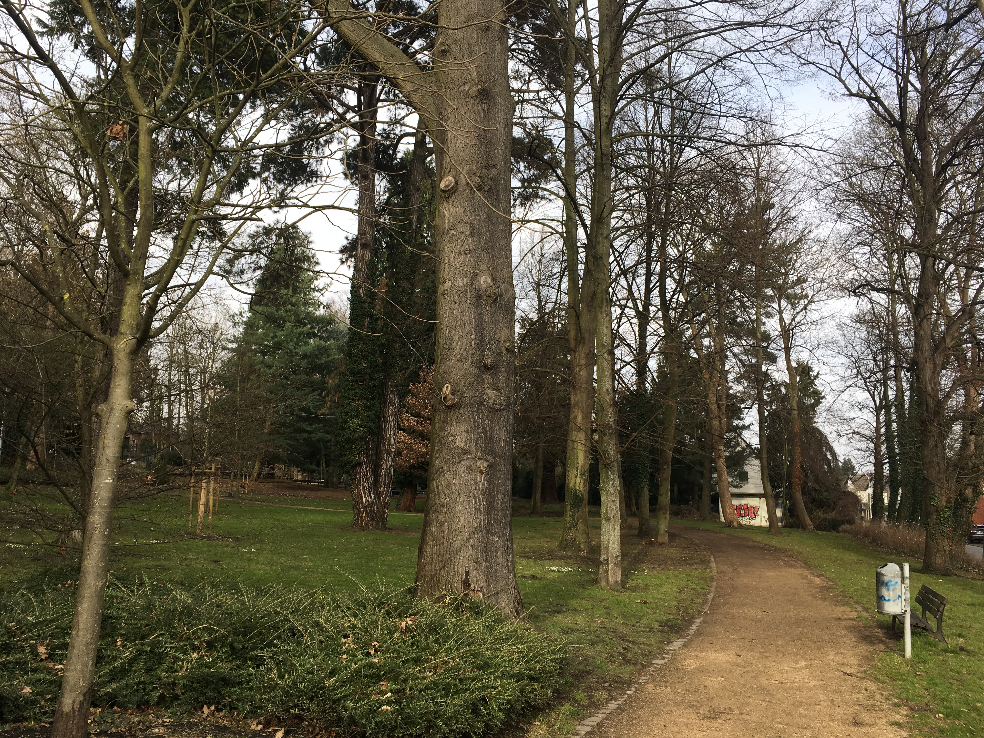 Kierberger Bahnhofspark, angelegt in den 1870er Jahren gemeinsam mit dem Kaiserbahnhof in Kierberg, einem Ortsteil der Stadt Brühl im Rhein-Erft-Kreis in Nordrhein-Westfalen